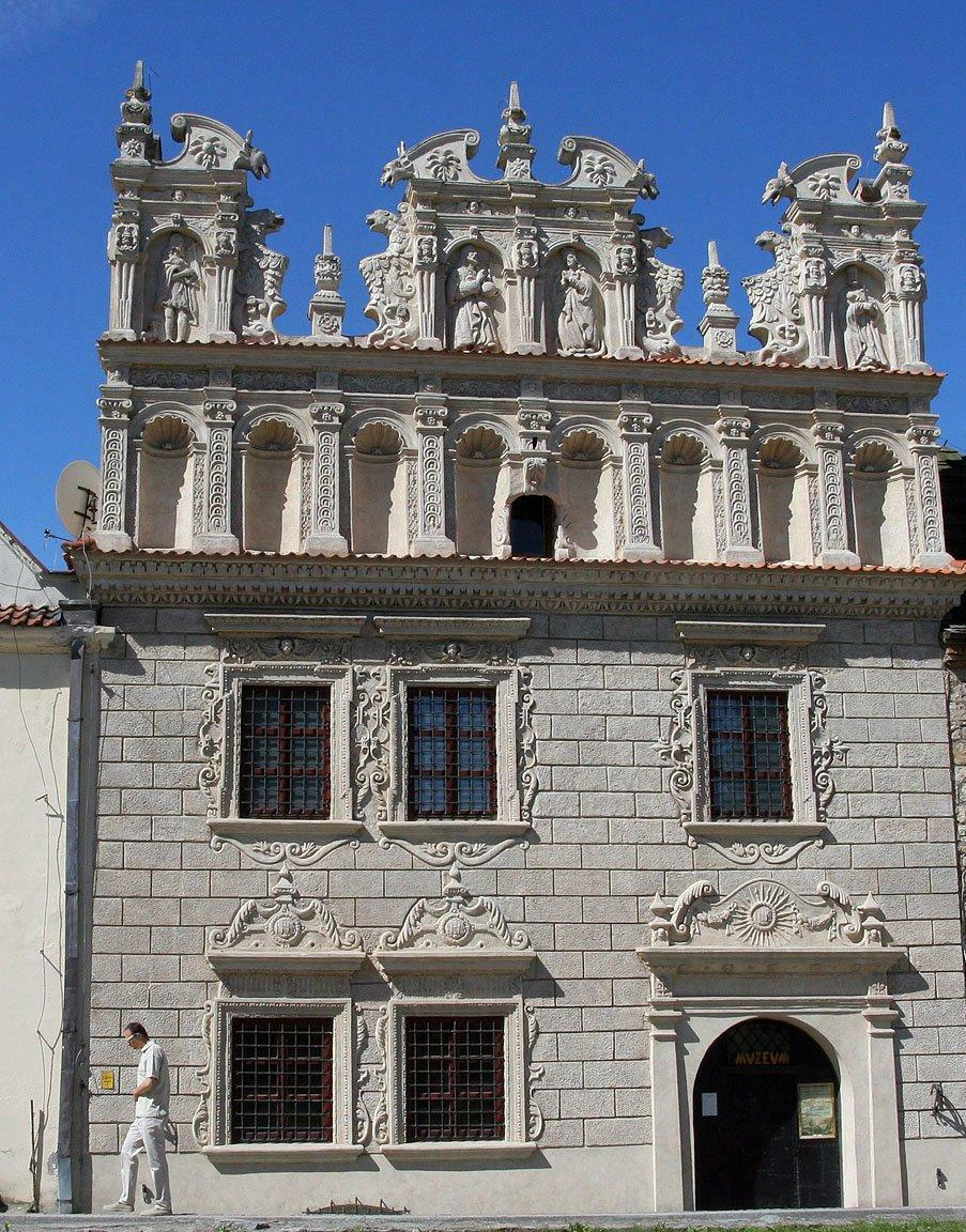 Kamienica Celejowska - siedziba Muzeum Nadwiślańskiego